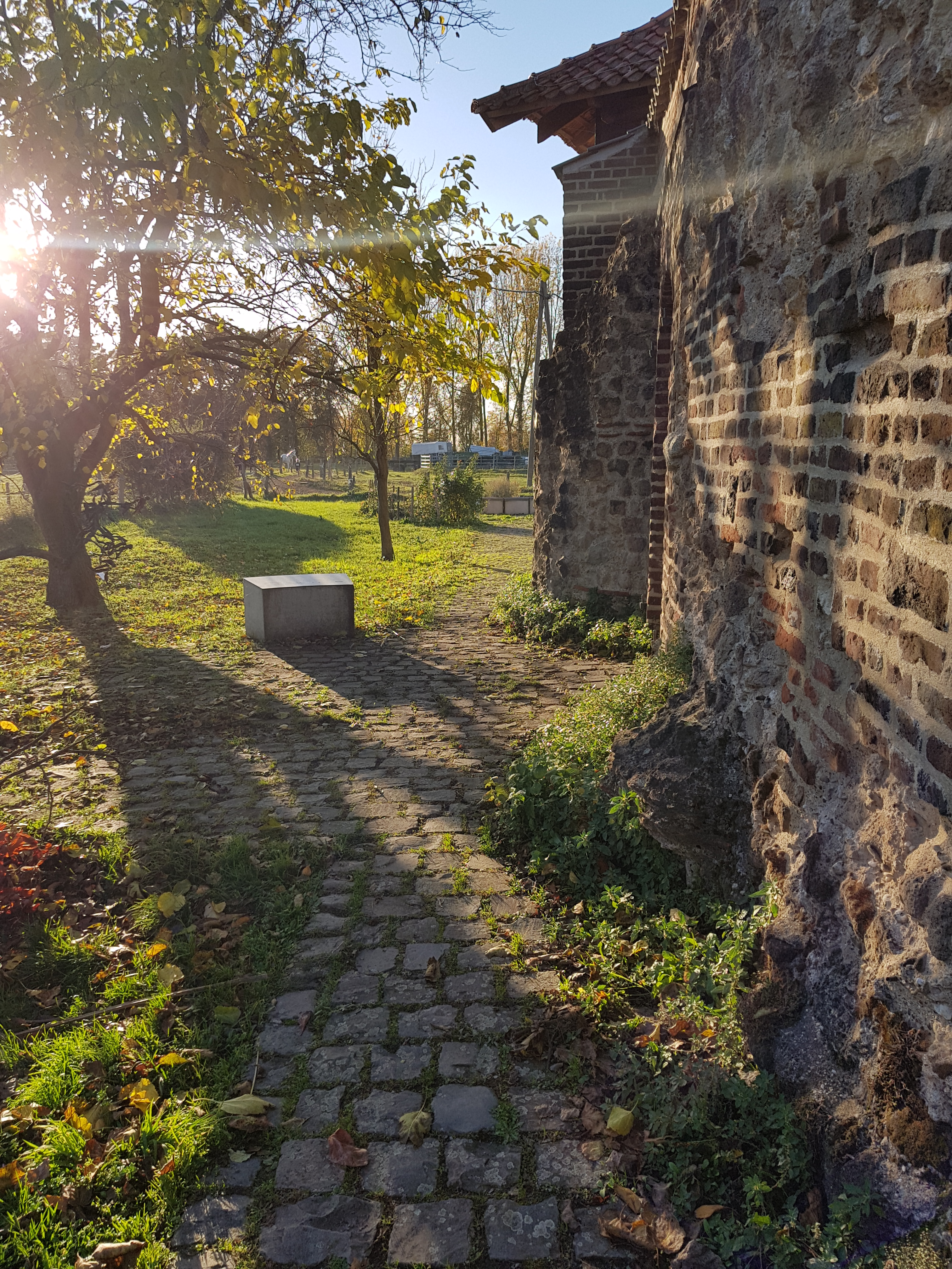 Archäologischer Aussenpfad und römisches Mauerwerk auf Haus Bürgel.